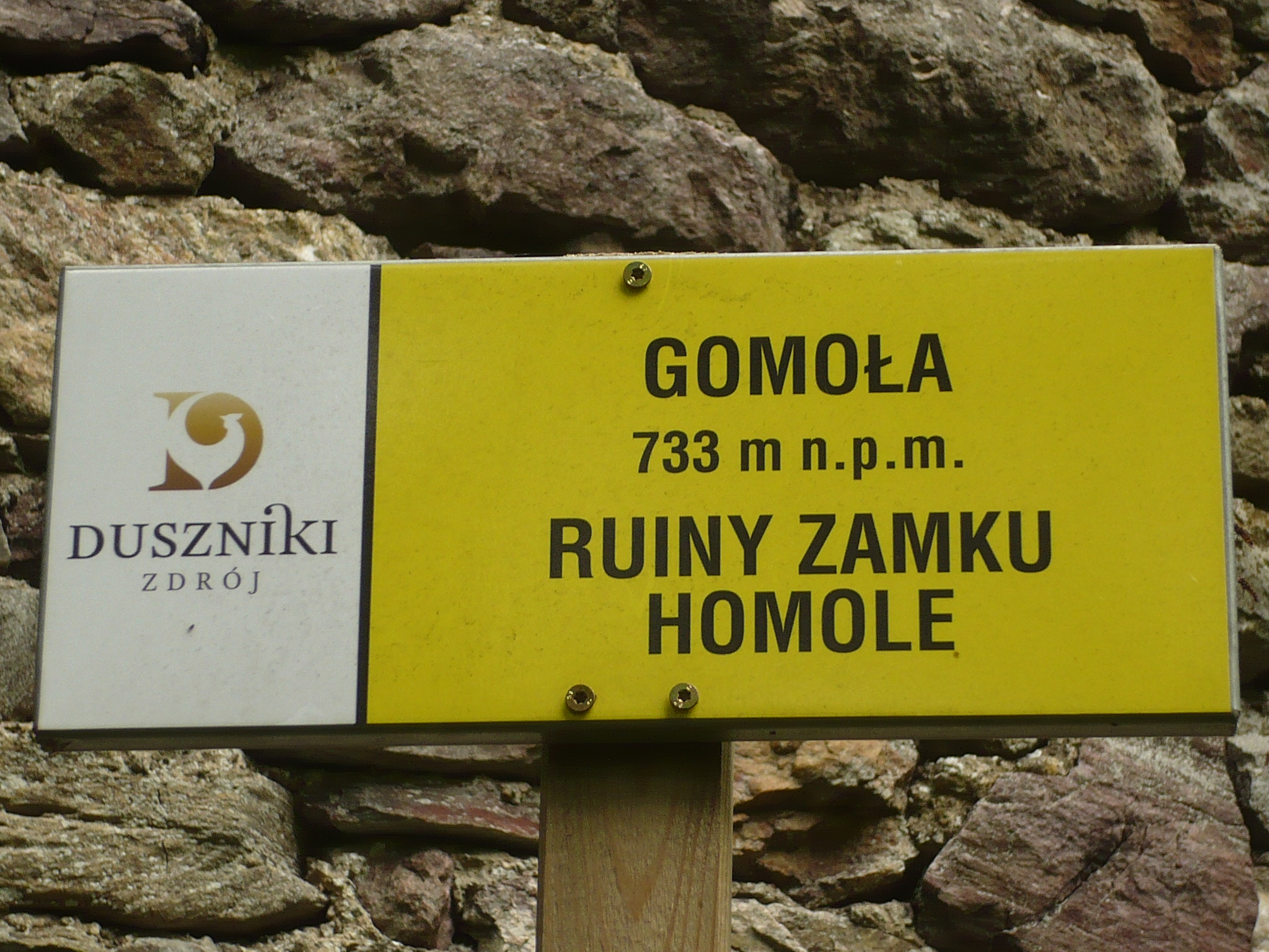 Zamek Homole